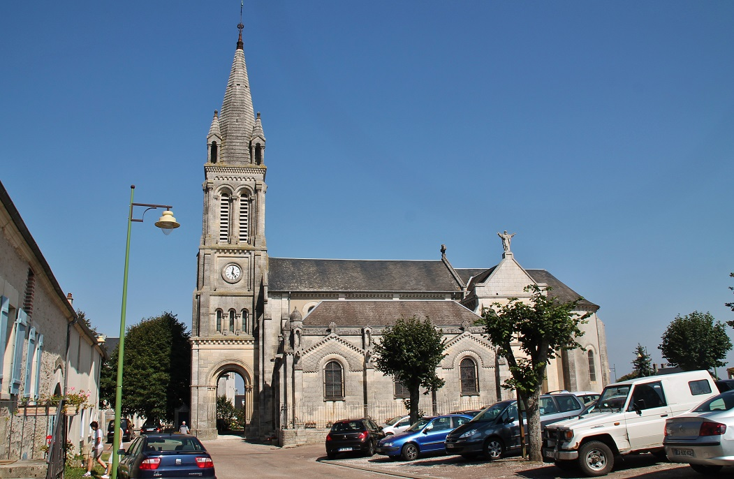 église St Leger